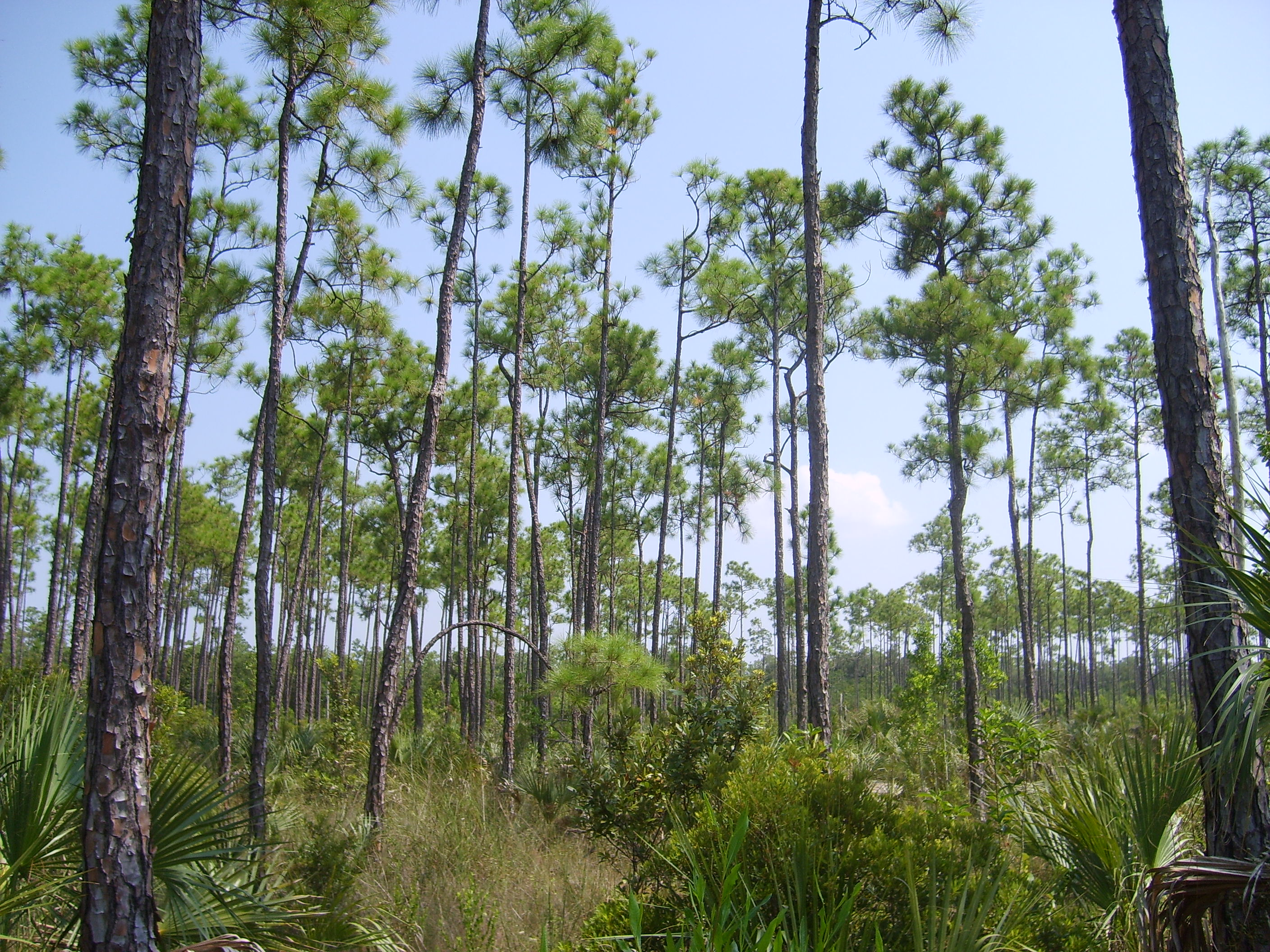 Pinèdeeverglades